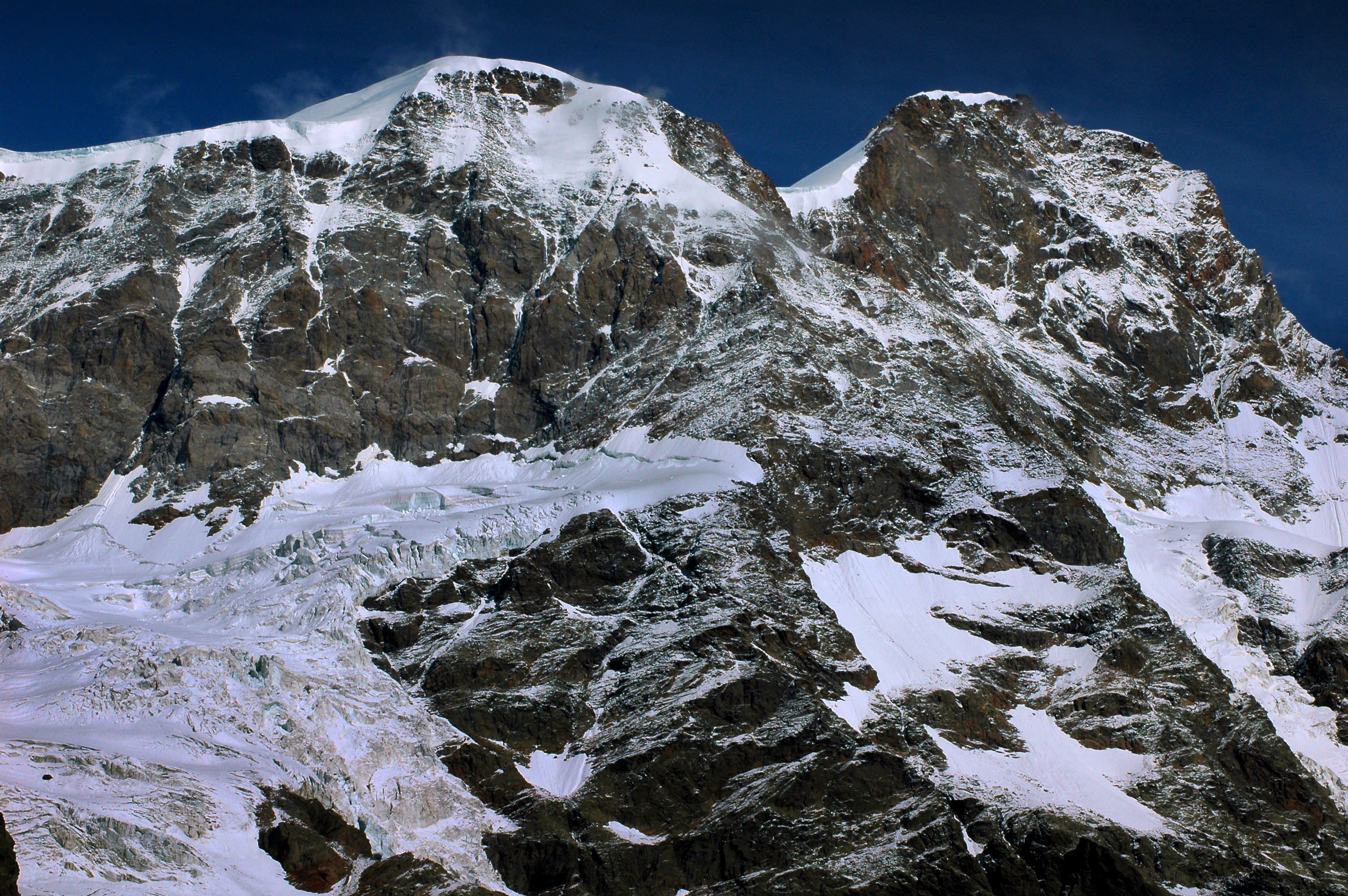 L'imponente parete Valsesiana del Monte Rosa alta quasi 1800 metri. Al centro la P.Parrot m.4436, a destra la P.Gnifetti m.4559